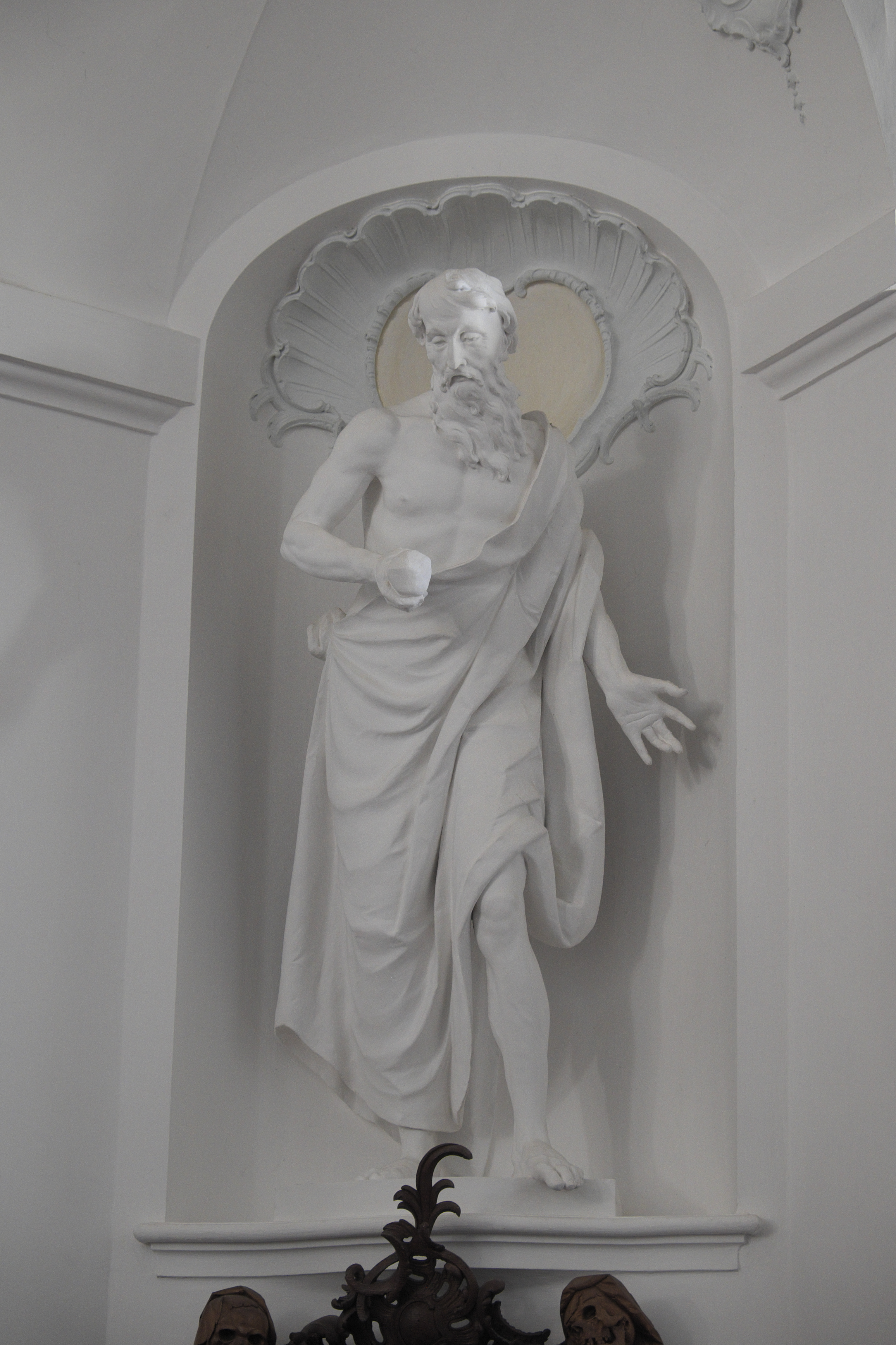 Katholische Pfarrkirche St. Marinus und Anianus, ehemalige Abteikirche des Benediktinerklosters Rott in Rott am Inn im Landkreis Rosenheim (Bayern/Deutschland), weiß gefasste Holzfigur in der Vorhalle